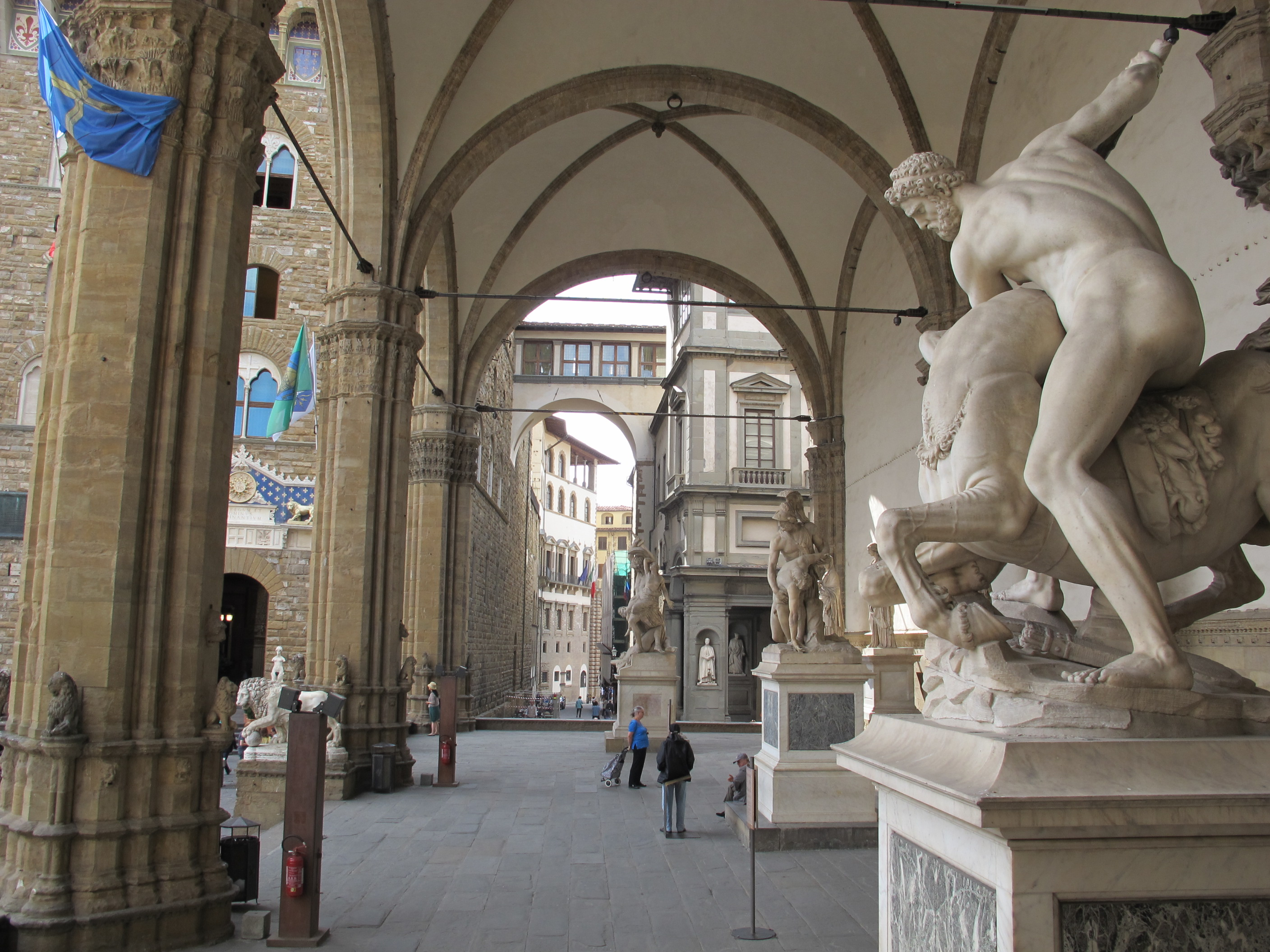 Loggia dei lanzi, veduta